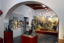 Sala con diorama de la batalla de la Trinidad de 1915 de la revolución mexicana